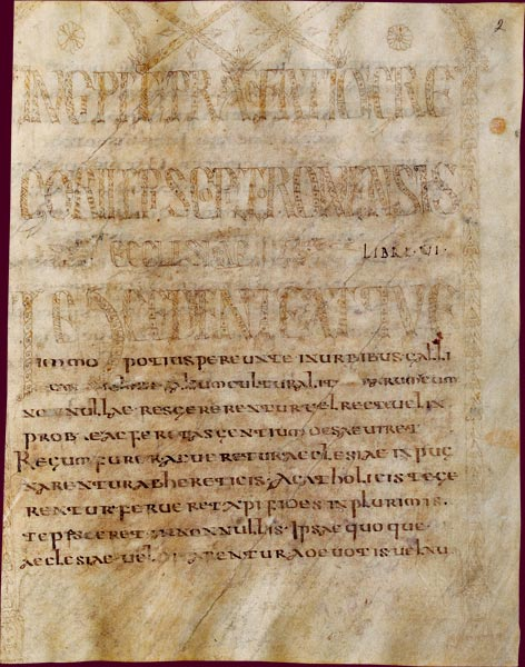 Grégoire de Tours, Histoire des Francs, livres 1 à 6, Page de frontispice. Luxeuil ou Corbie, fin du VIIe siècle BnF, Manuscrits, Latin 17655 fol. 2 Transcrit dans une écriture cursive difficile à lire, ce célèbre ouvrage relatant l'histoire mérovingienne est orné d'initiales dont les motifs géométriques ou zoomorphes cloisonnés et rehaussés de couleurs vives illustrent bien le vocabulaire décoratif pratiqué en Gaule au VIIe siècle. Composé d'un titre à lettres enclavées sous une triple arcade réalisée dans le style de Luxeuil, le frontispice illustre bien le vocabulaire décoratif mérovingien. Les éléments géométriques cloisonnés, auxquels s'ajoutent des poissons et des oiseaux, sont enrichis de palmettes et de fleurons qui annoncent l'art carolingien.